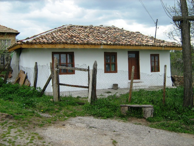 Джамията, намираща се в горната махала на село Долна Кабда. Фото: Вл. Стойков - април 2008 год.